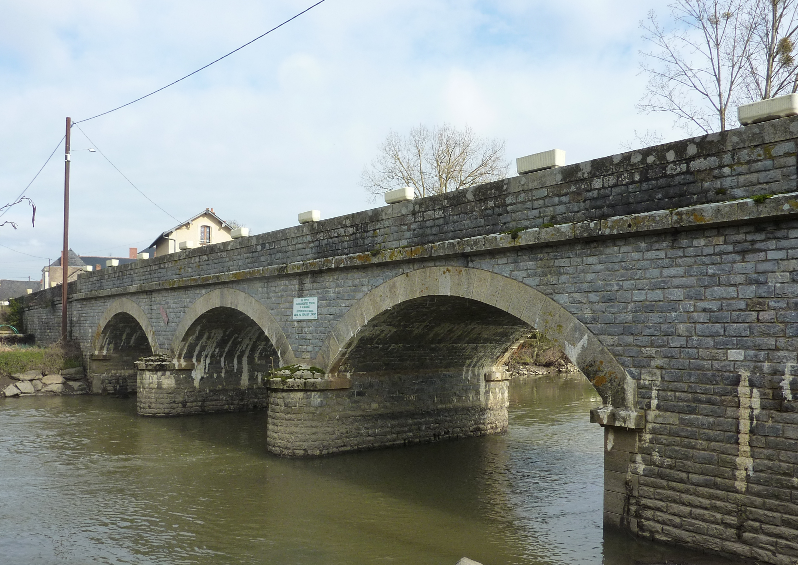 Pont de Saint-Aubin-de-Luigné (Maine-et-Loire, France), sur le Layon. Vue d'ensemble (panneau : Par respect des riverains et des pêcheurs, il est demandé aux promeneurs en barque de ne pas dépasser le pont).